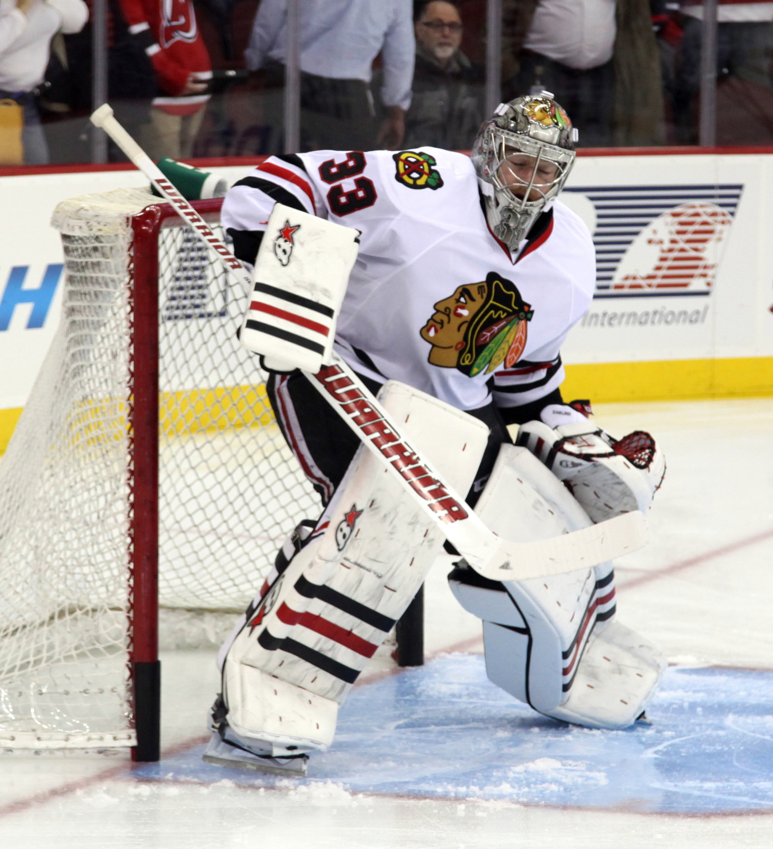 Scott Darling in December 2014.